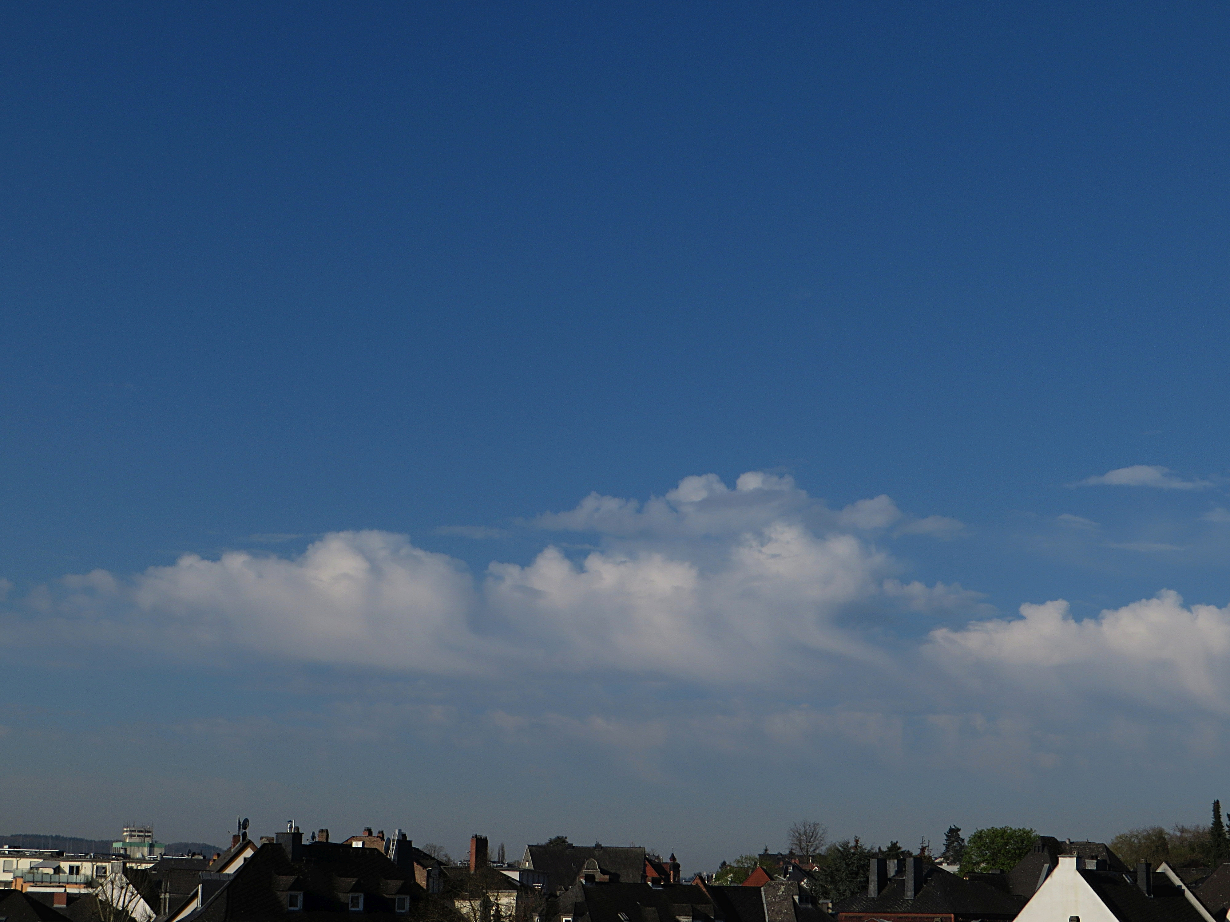 Stratocumulus castellanus virga, gesehen südwestlich von Limburg an der Lahn. Bei genauem Hinsehen sind Vereisungen der Oberseiten erkennbar.